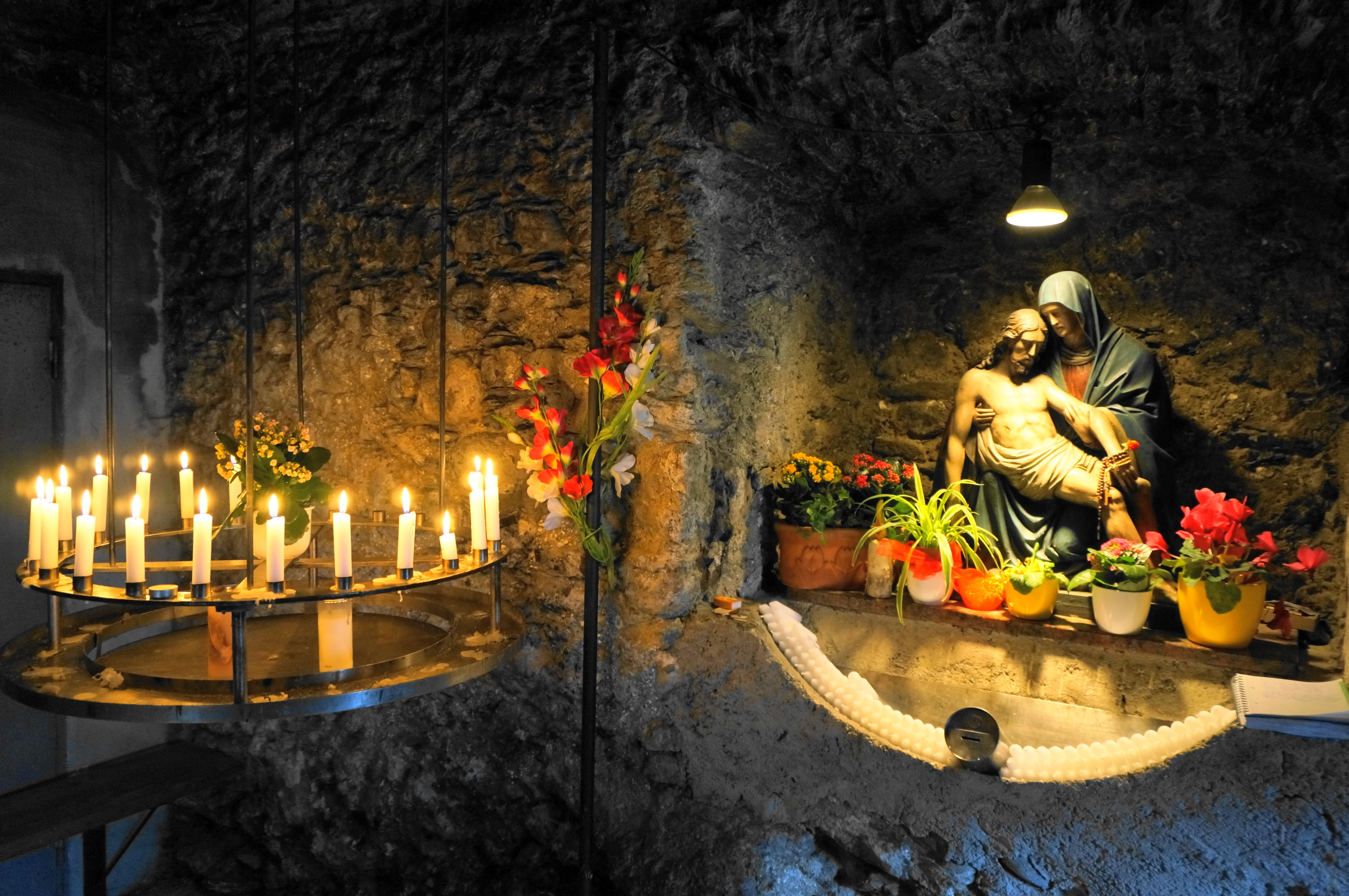 Seit der Neugestaltung im Jahre 1993 durch Architekt Felix Orsini-Rosenberg wird das Thermalwasser in der Unterkirche aufgefangen und erfreut sich großer Beliebtheit, wo es als Taufwasser in der Taufkapelle Verwendung findet.